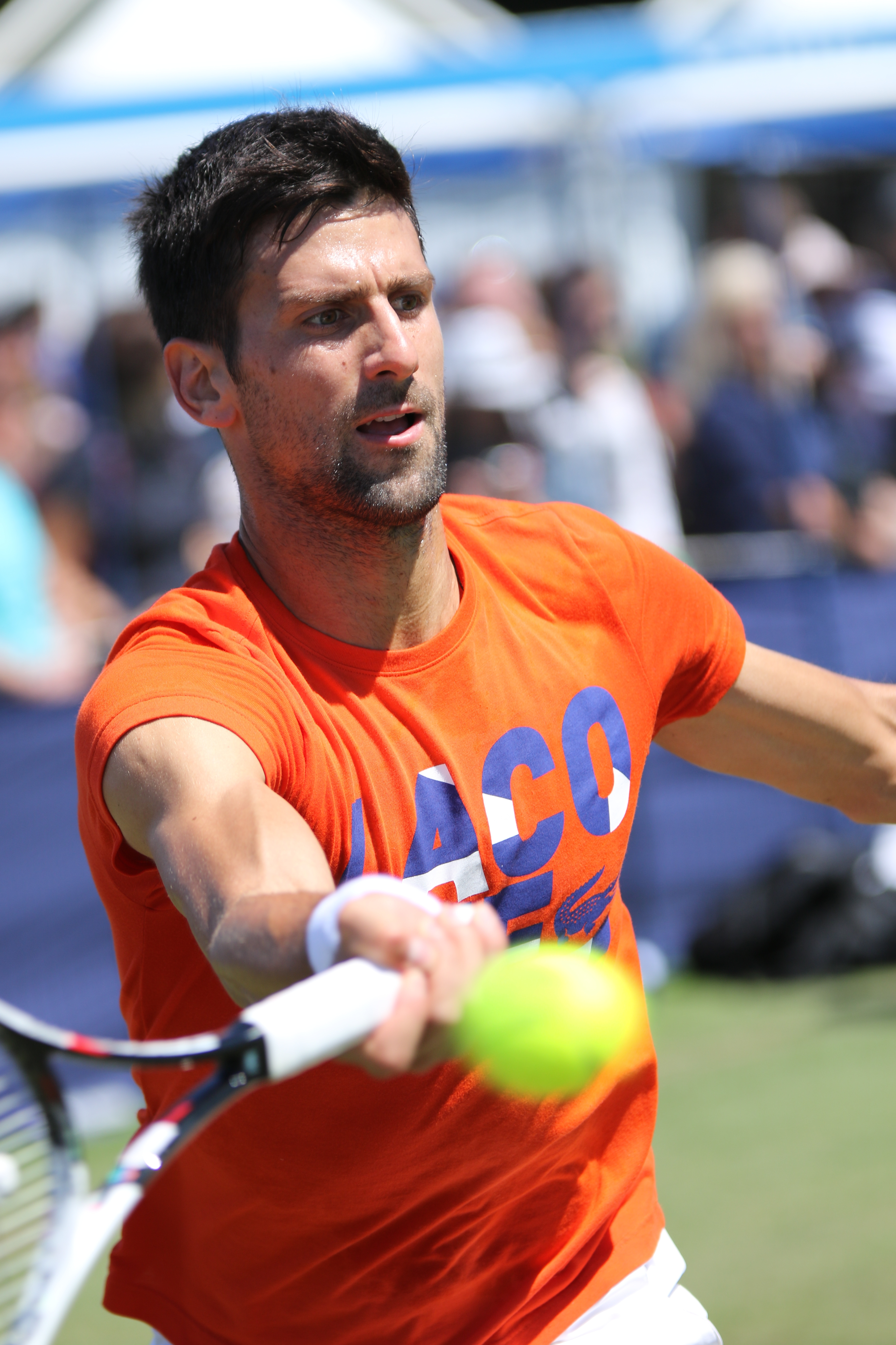 Novak Djokovic